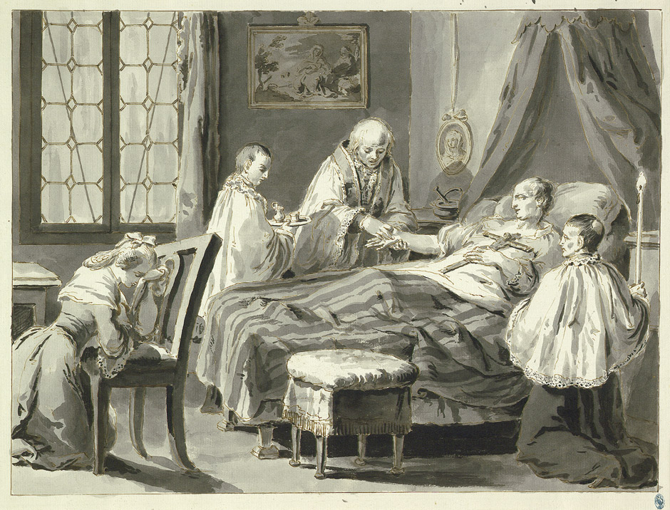 Krankensalbung, aus einer Serie der sieben Sakramente: Federzeichnung, ca. 38,5 x 52,5 cm; hergestellt im Auftrag von Padre Ghedini